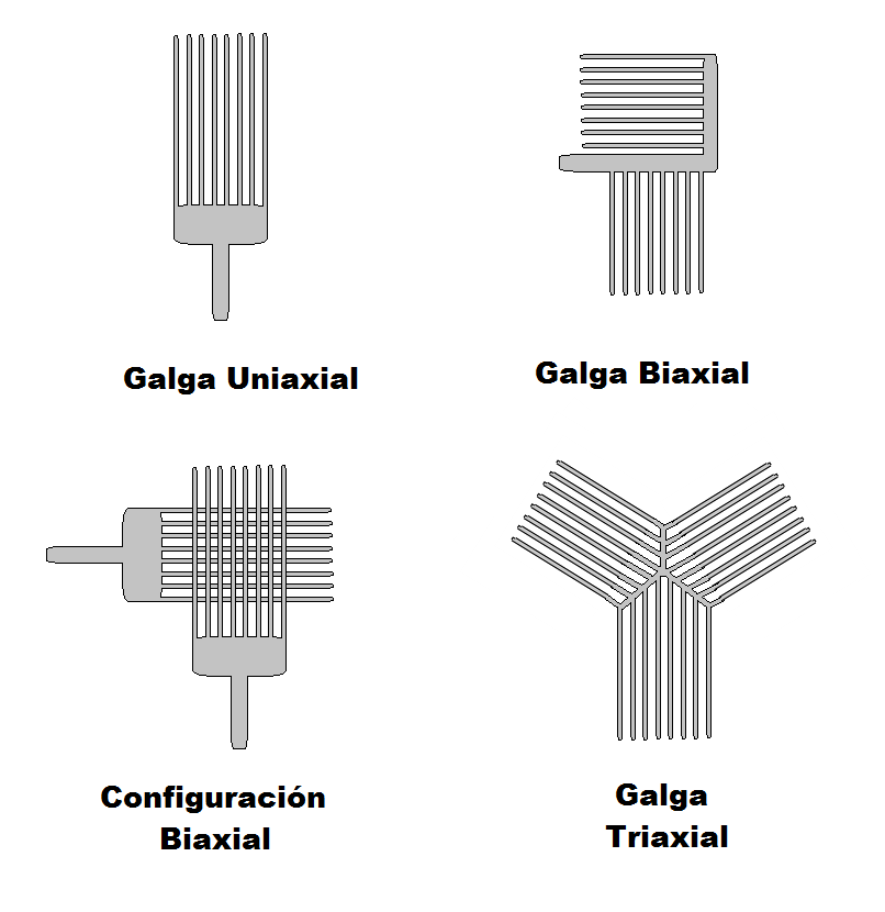 Alguna posibles configuraciones que puede tener una galga